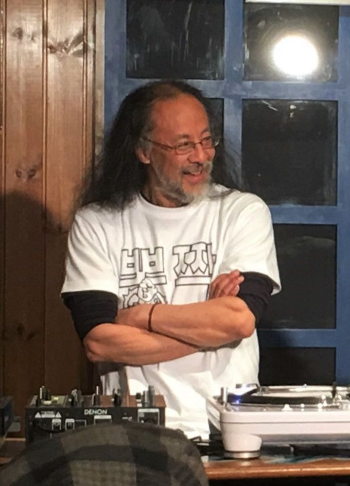 根本敬（2017年3月26日撮影）